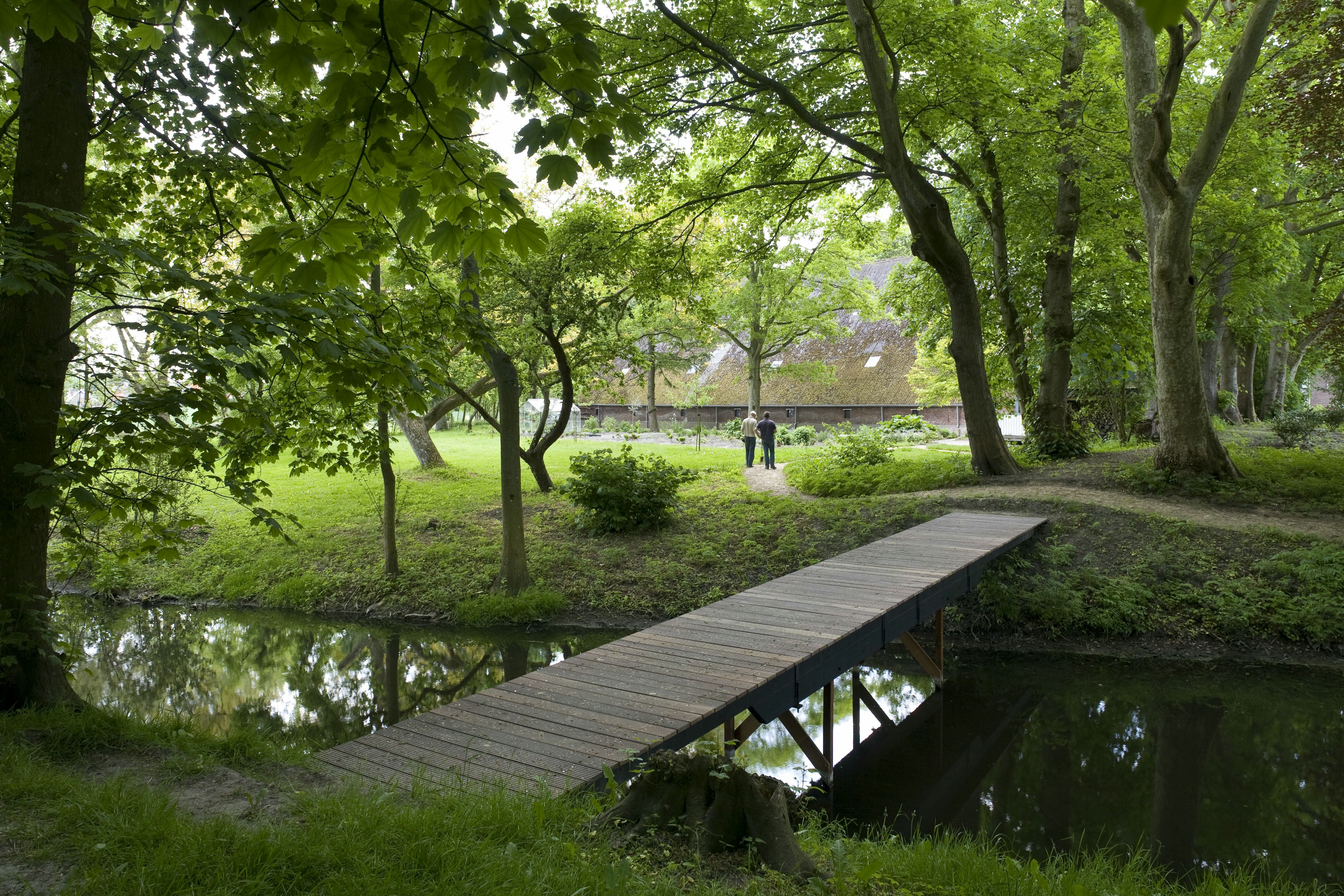 Meyma: Overzicht van de tuin met bruggetje over sloot, villaboerderij op de achtergrond